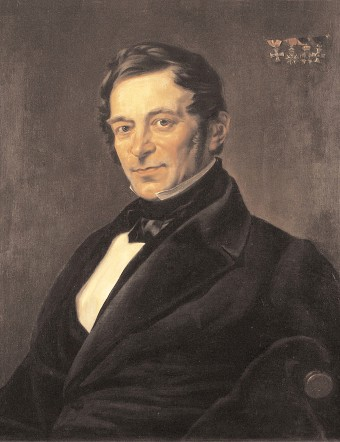 Leopold Schoeller (1792-1884) gründete 1842 mit seinen Söhnen in Düren die Tuchfabrik Schoeller u. Söhne, deren Fabrikate bald Weltruf hatten und auf den großen internationalen Ausstellungen höchste Auszeichnungen erhielten. 1854 ging aus diesem Unternehmen die Teppichfabrik von Gebrüder Schoeller hervor